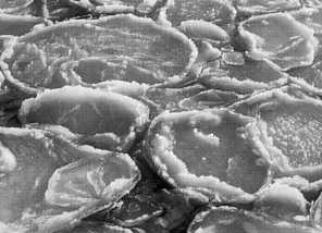 Pfannkucheneis in der westlichen Ostsee